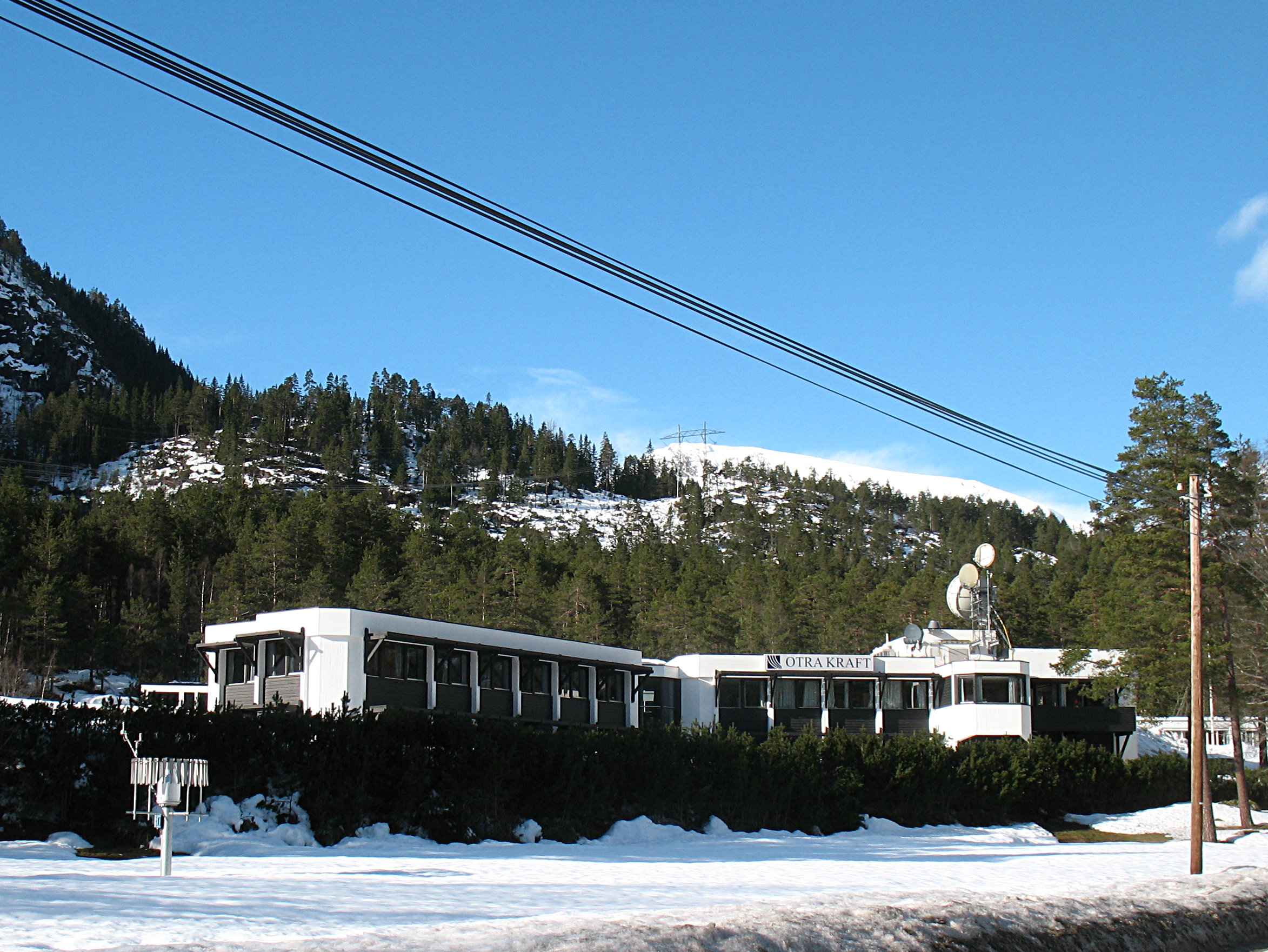 Otra krafts hovedkontor på Rysstad i Valle, Aust-Agder. Fra RV 9.